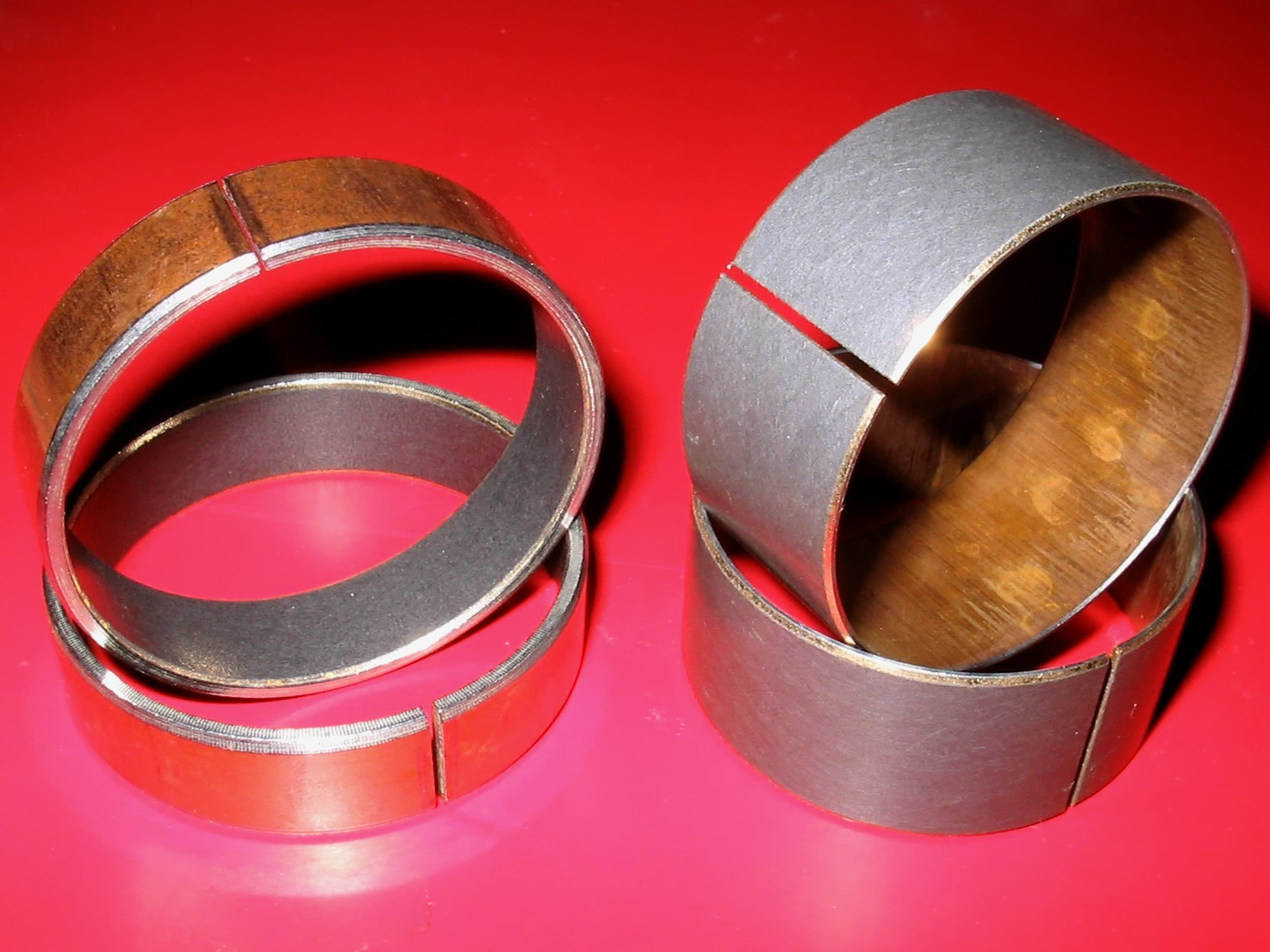 Boccole di forza per una forcella telescopica. A sinistra la boccola del fodero, che lascia scorrere lo stelo al suo interno, per questo ha un trattamento di colore nero all'interno. A destra la boccola dello stelo, che scorre all'interno del fodero, per questo ha un trattamento di colore nero all'esterno.